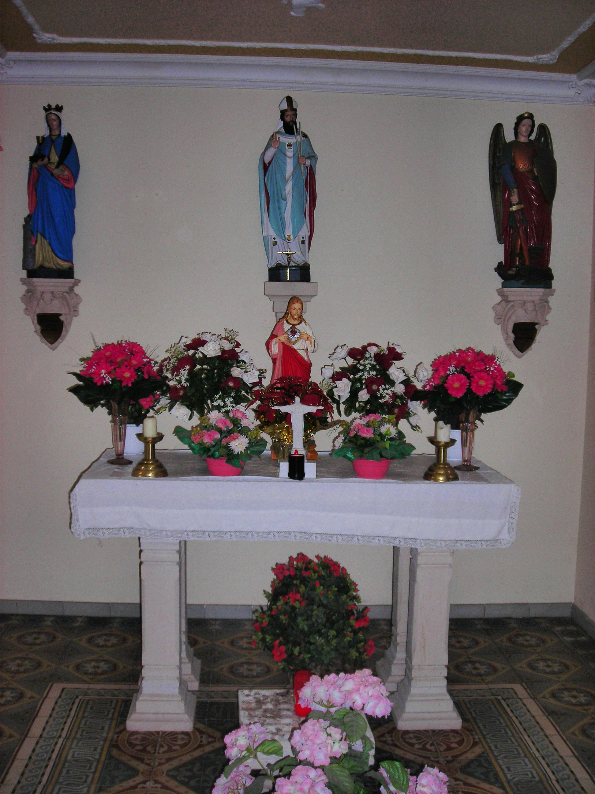 Chapelle St-Blaise à Berviller-en-Moselle (57 France)